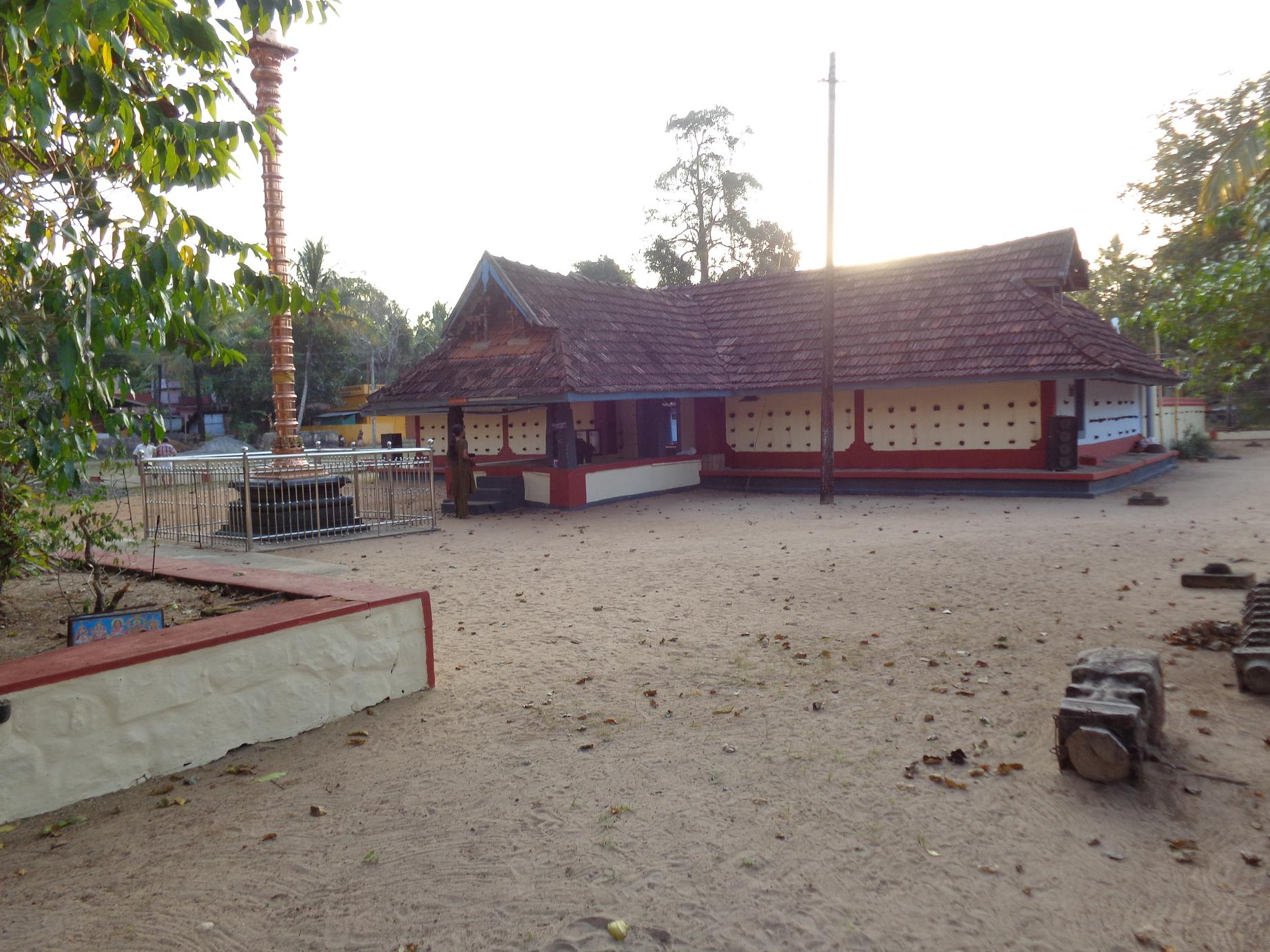 മാവേലിക്കര പ്രായിക്കര ധന്വന്തരീക്ഷേത്രം